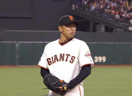 Keiichi Yabu